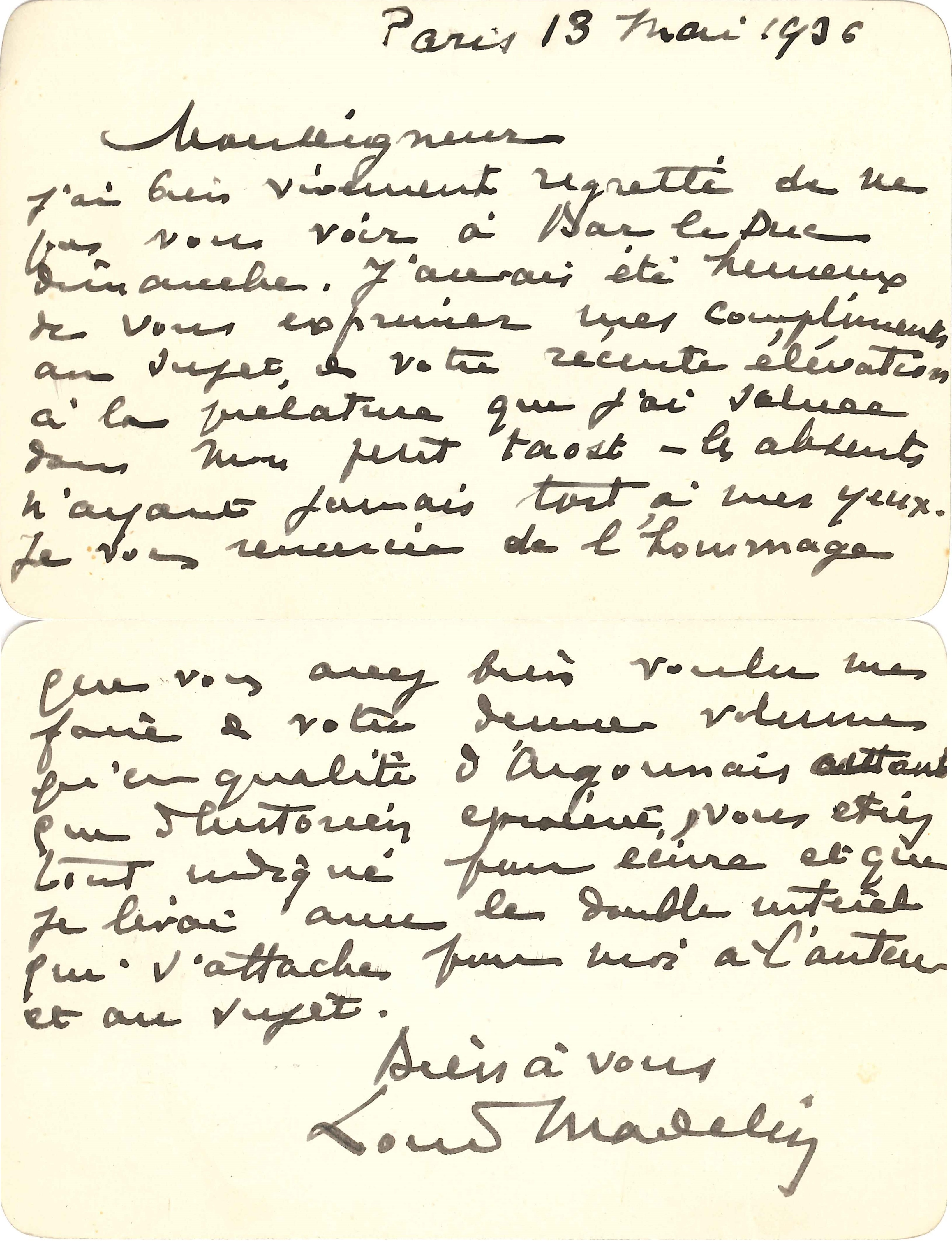 Cette carte datée le 13 mai 1936 fut adressée à Monseigneur Charles Aimond. Source : Archives Jean Grosdidier de Matons (1926–2017), sans doute par sa nièce Jeanne Buitge qui accompagna Mgr Aimond au cours de sa vie.